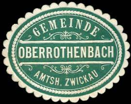 Sealing stamp Title: Gemeinde Oberrothenbach - Amtshauptmannschaft Zwickau Description: grün, weiß, geprägt Place: Oberrothenbach size: 3x4 cm